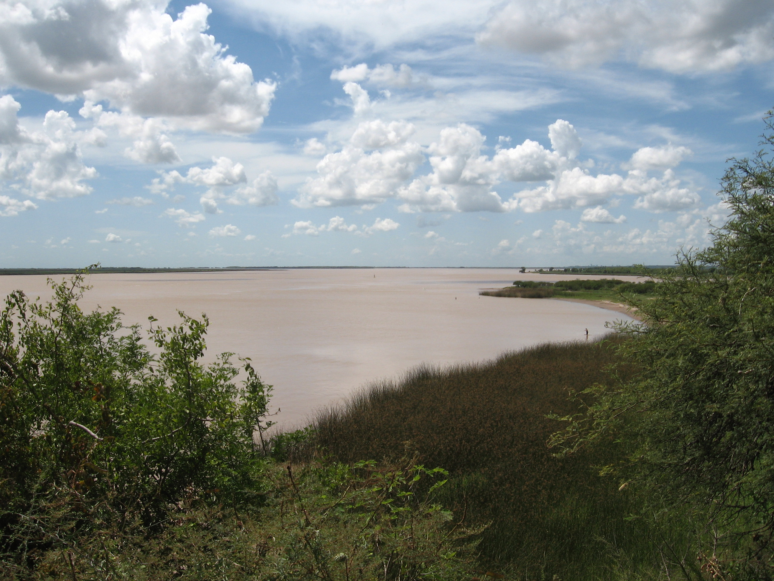 Río Paraná, en el sitio en donde se celebró la Batalla de Vuelta de Obligado